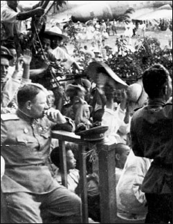 1945-08-24 함흥에 도착한 소련 제25군 사령관 치스차코프가 환영나온 군중을 바라보고 있다.